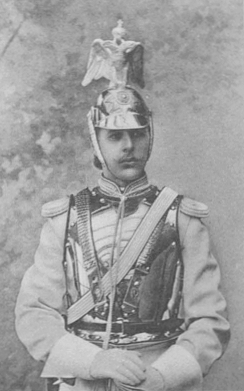 Светлейший князь Анатолий Павлович Ливен, Pотмистр Кавалергардского полка, герой Первой мировой войны, Полковник (1919).